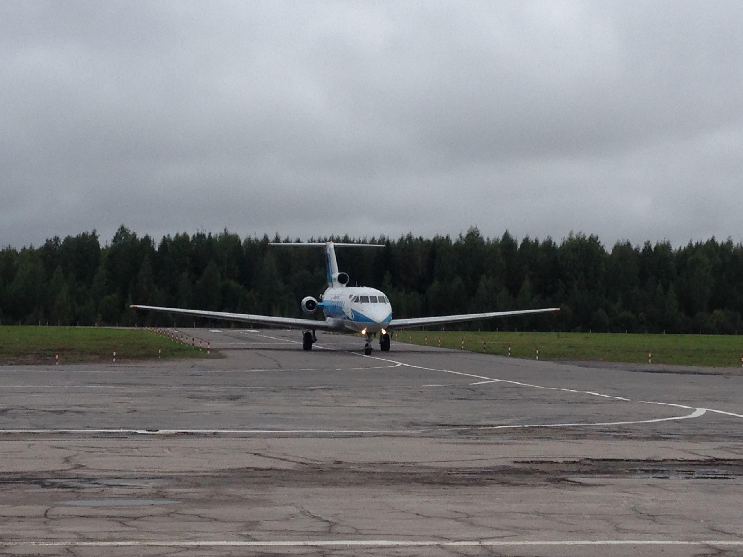 Як-40 на аэродроме "Вытегра"